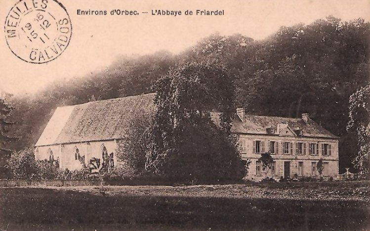 abbaye de Friardel